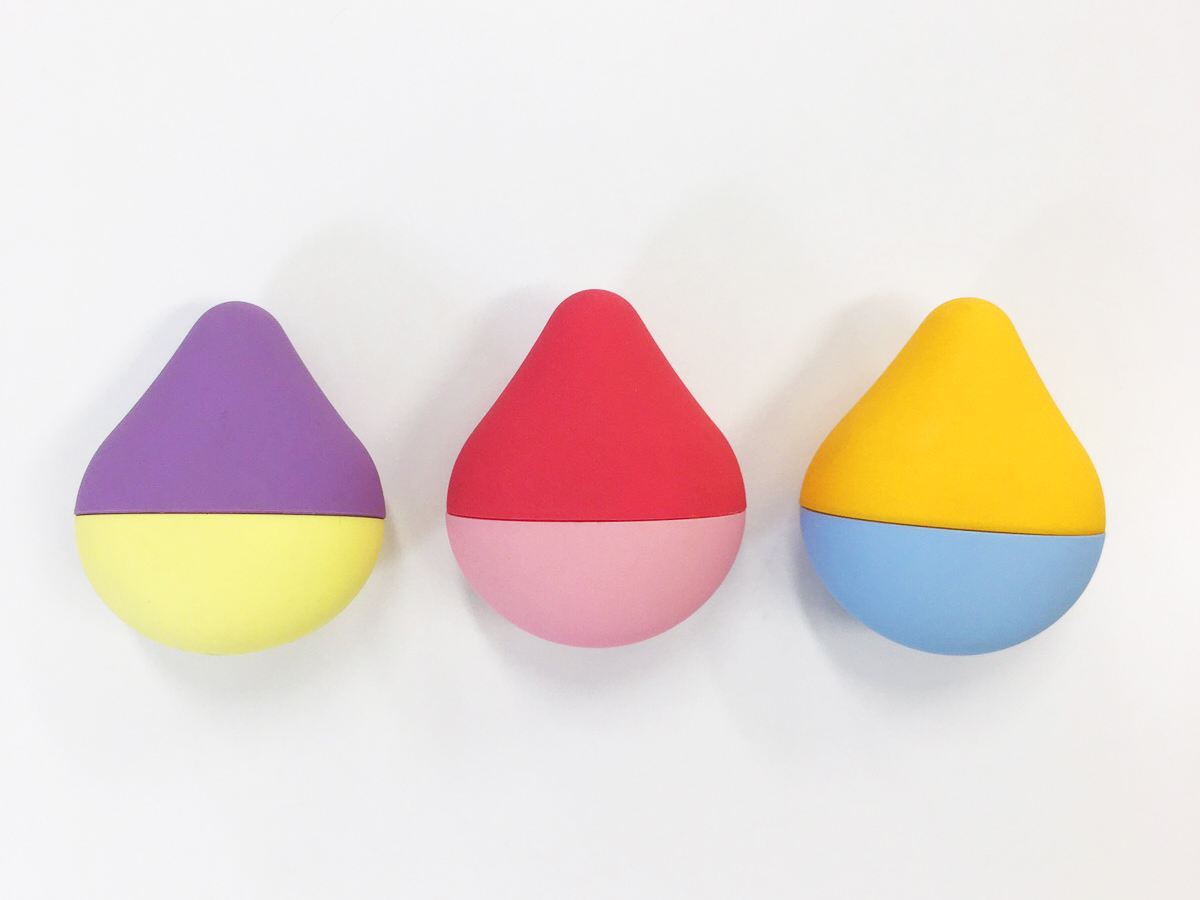 irohamini